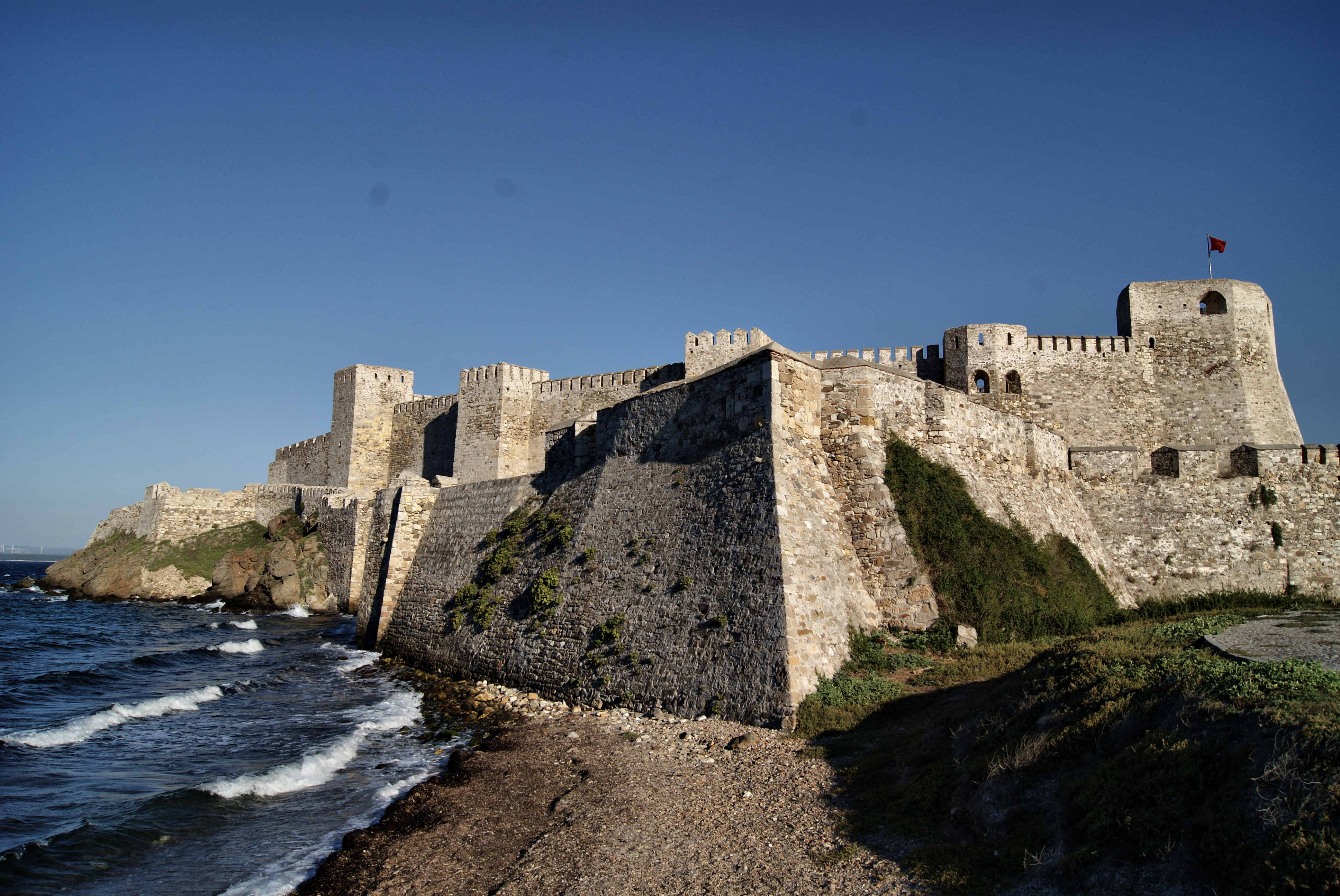 Bozcaada